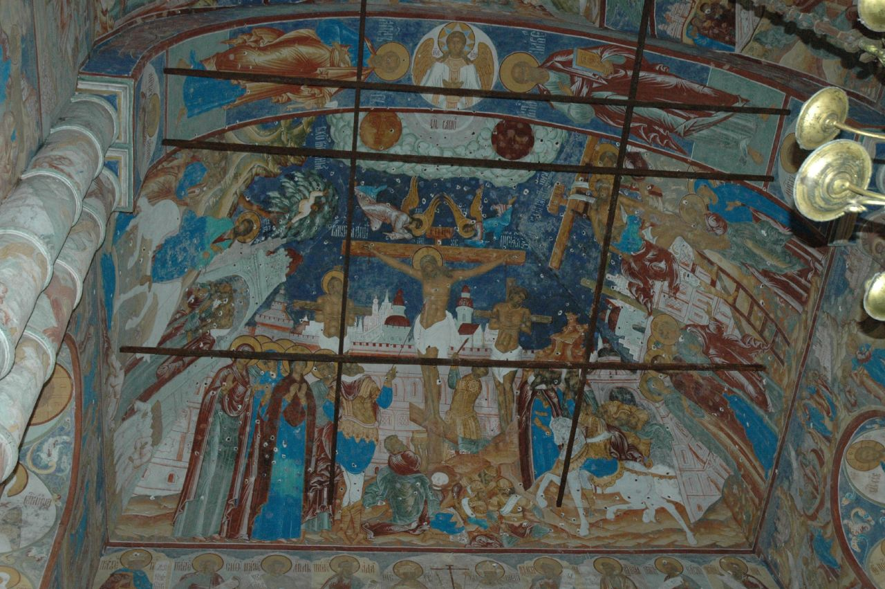 Frescoes (4)